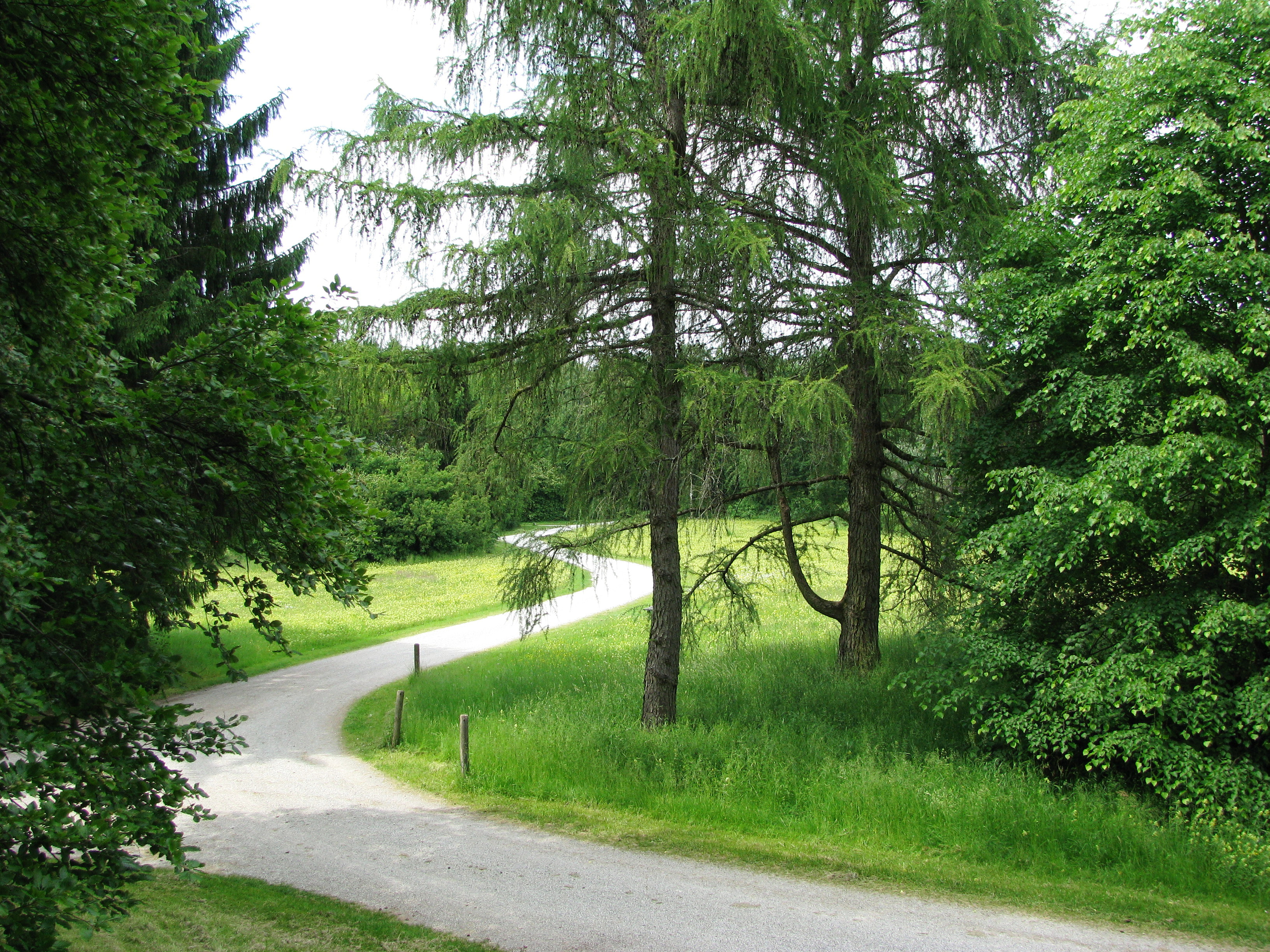 Neuer Teil des Waldfriedhofs in München (Landschaftsschutzgebiet in Bayern mit der Nummer LSG-00120.15).